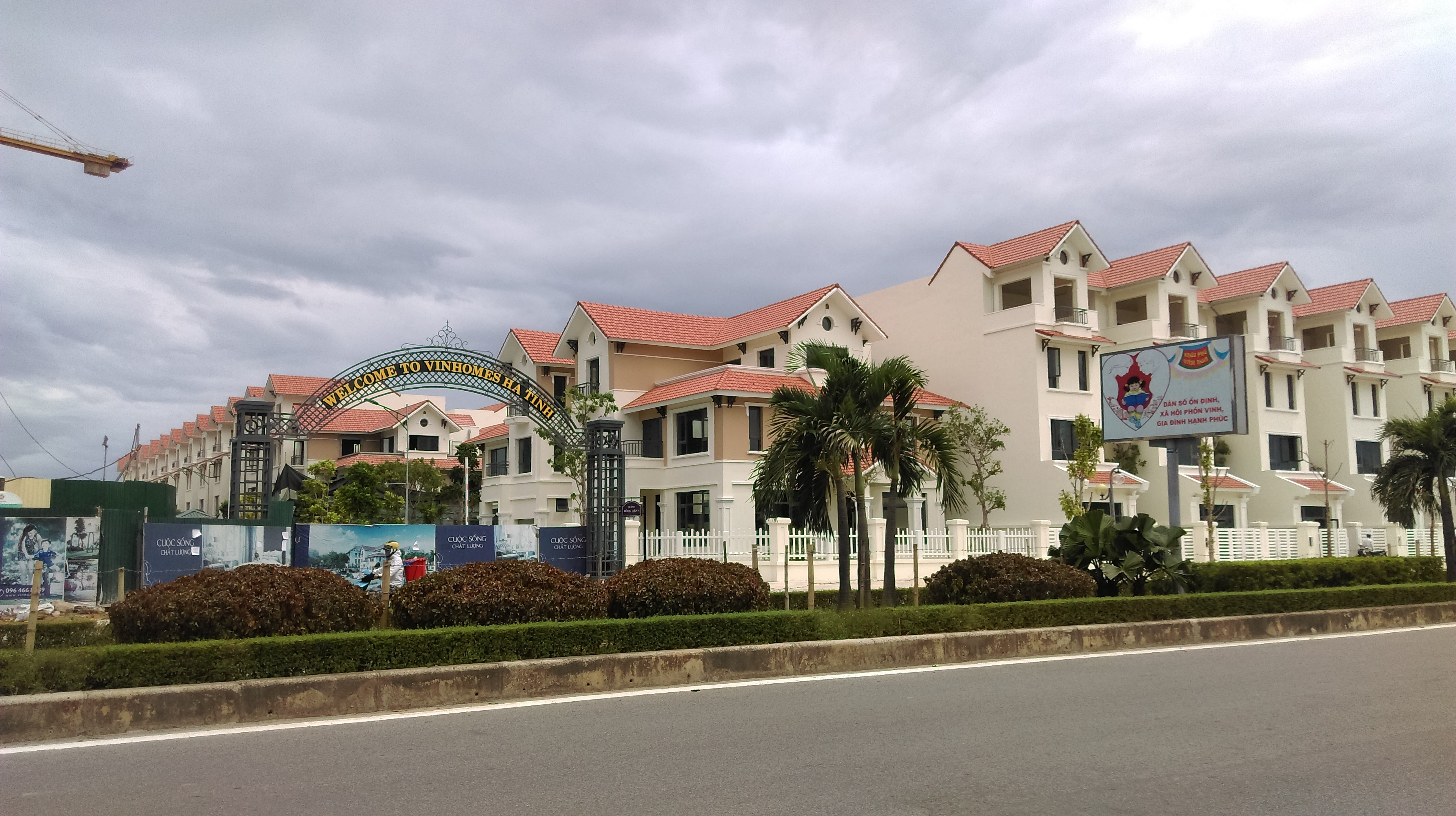 VinHomes Tp Hà Tĩnh